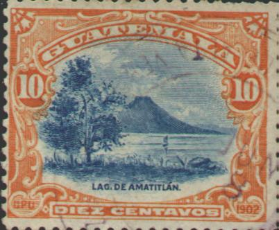 марка